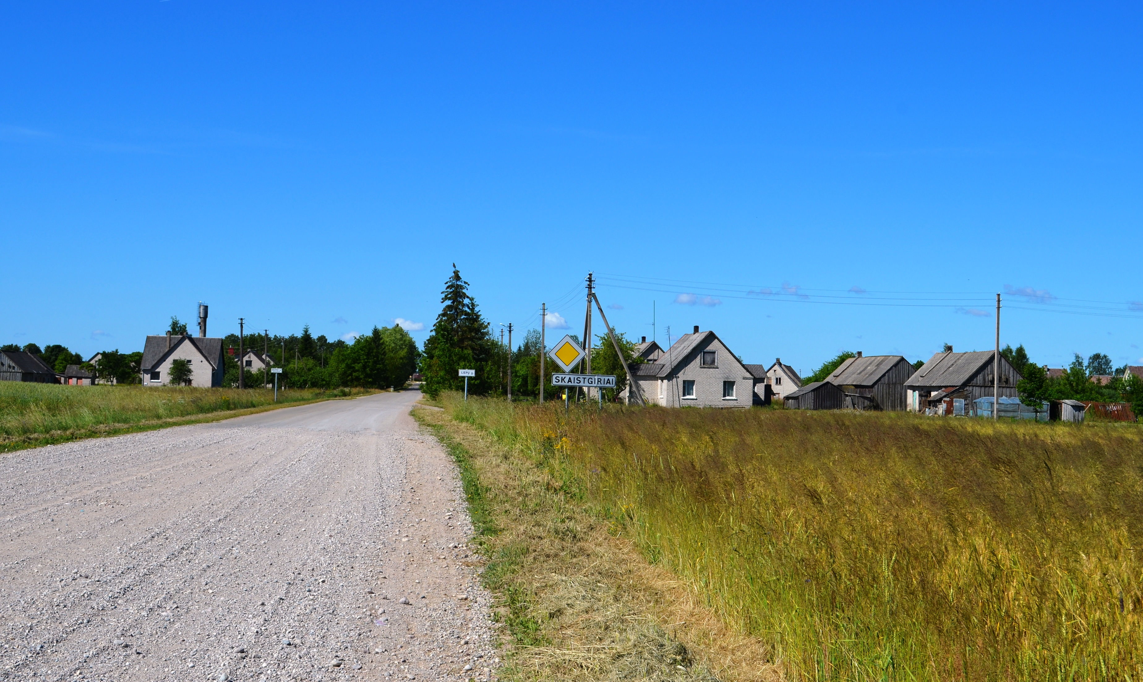 Skaistgiriai, Kėdainių raj.